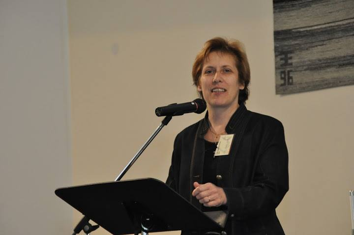 Kärt Jänes-Kapp